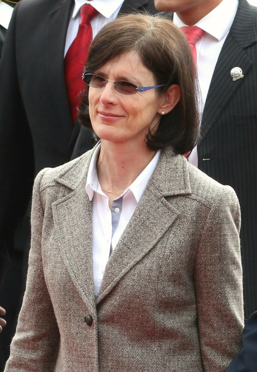 Quito, 24 de mayo de 2017 (Andes).- Varios Mandatarios y delegaciones extranjeras asistieron este 24 de mayo a la Ceremonia de Transmisión del Mando Presidencial del Ecuador. ANDES/Micaela Ayala V.